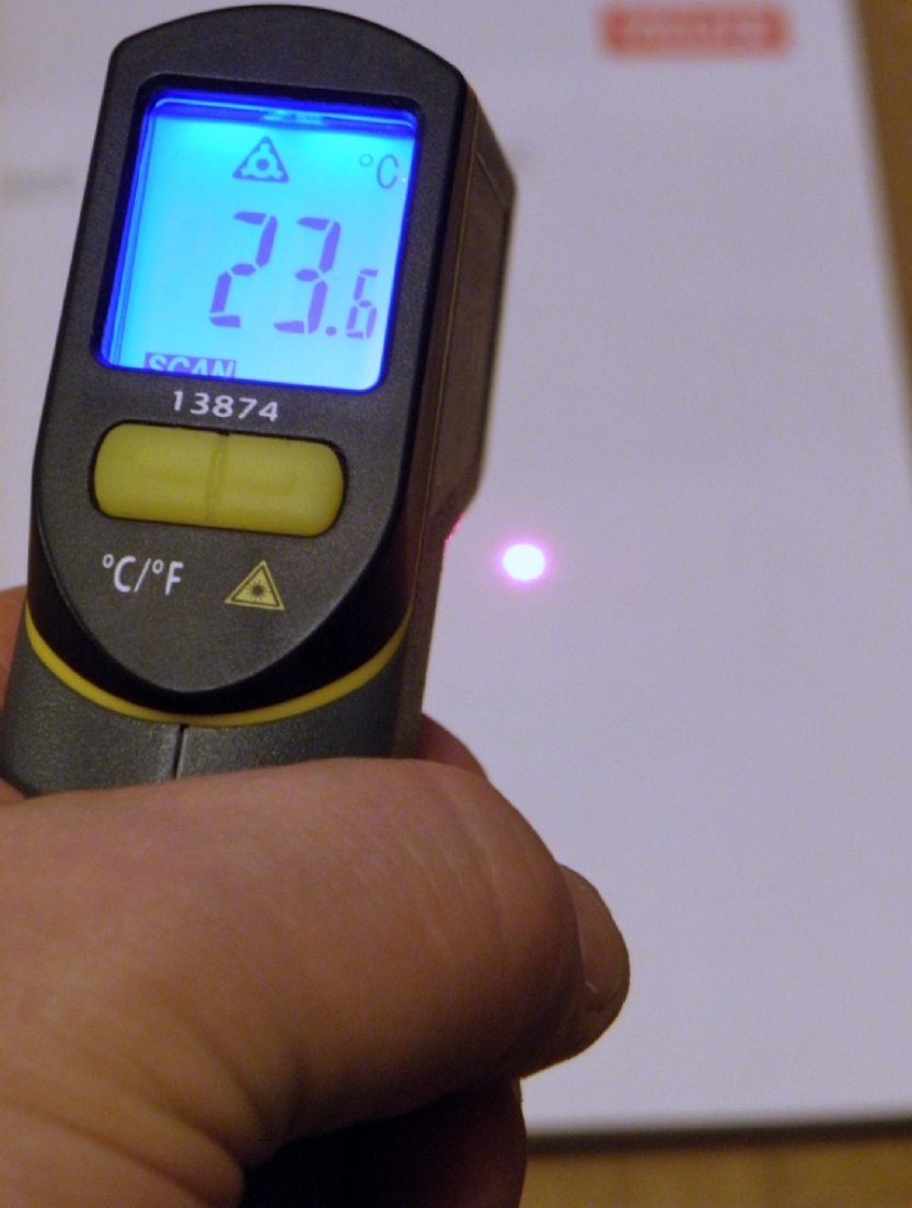 Infrarot-Thermometer